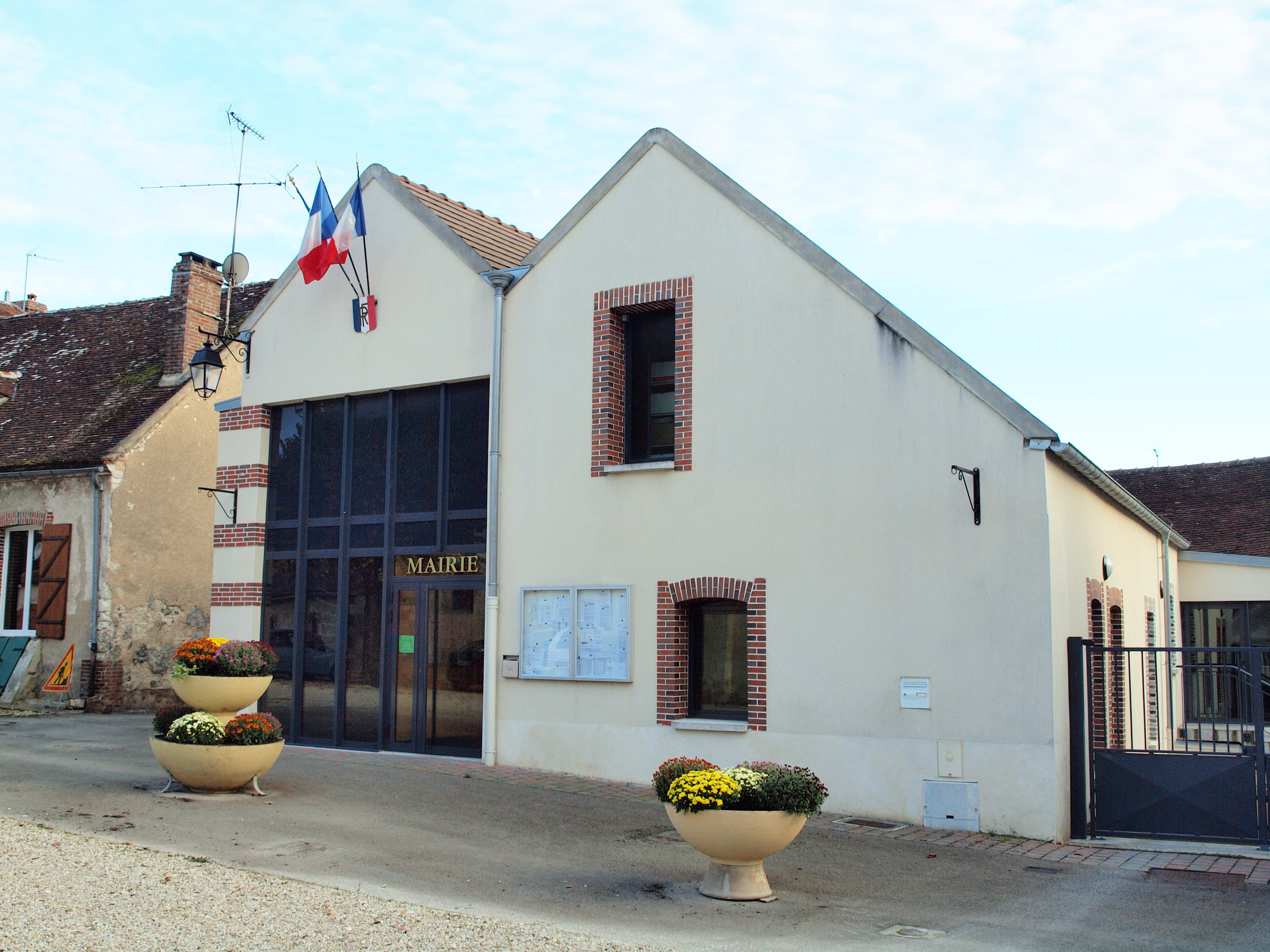 Bassou (Yonne, France)